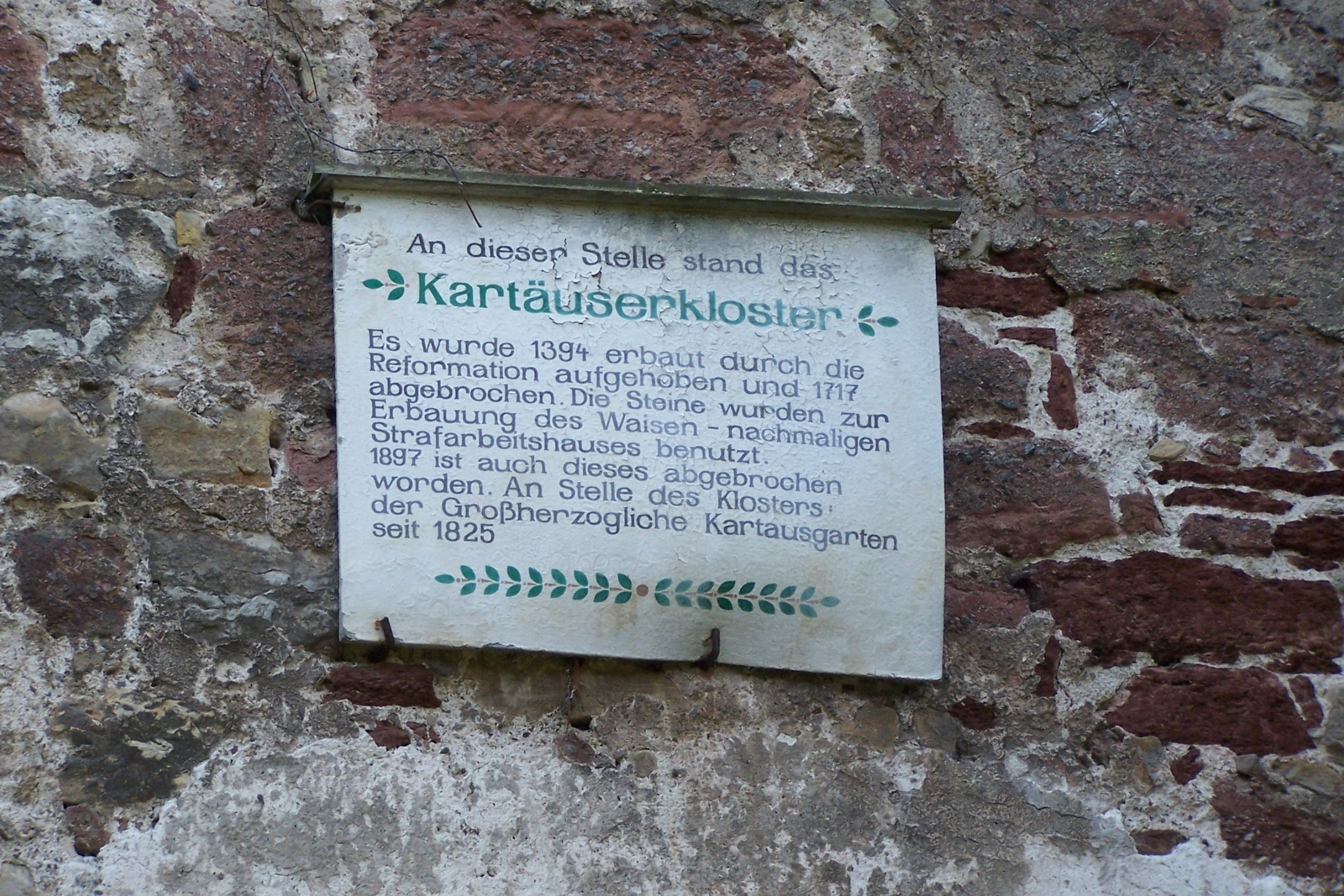 Ehemalige, jetzt entfernte Erläuterungstafel zur Geschichte des Gebäudes.